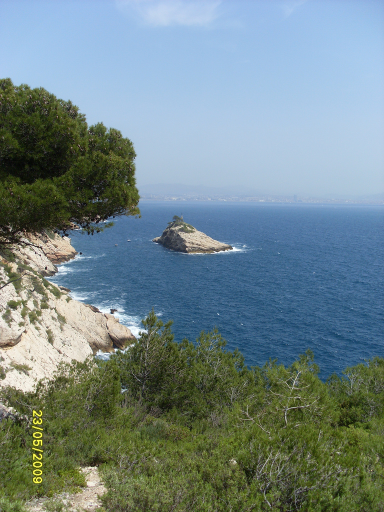 Vue sur l'île d'Érevine avec Marseille en arrière plan.